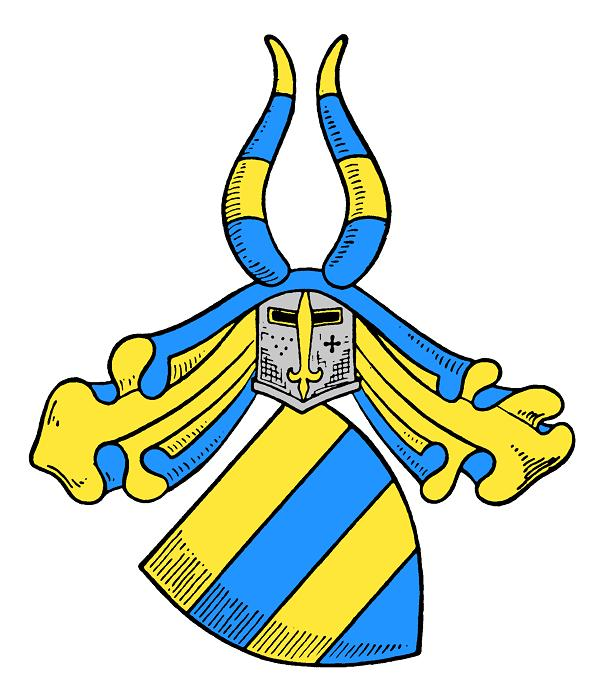 Armories de la famille von Ditfurth, tirée de Wikipedia